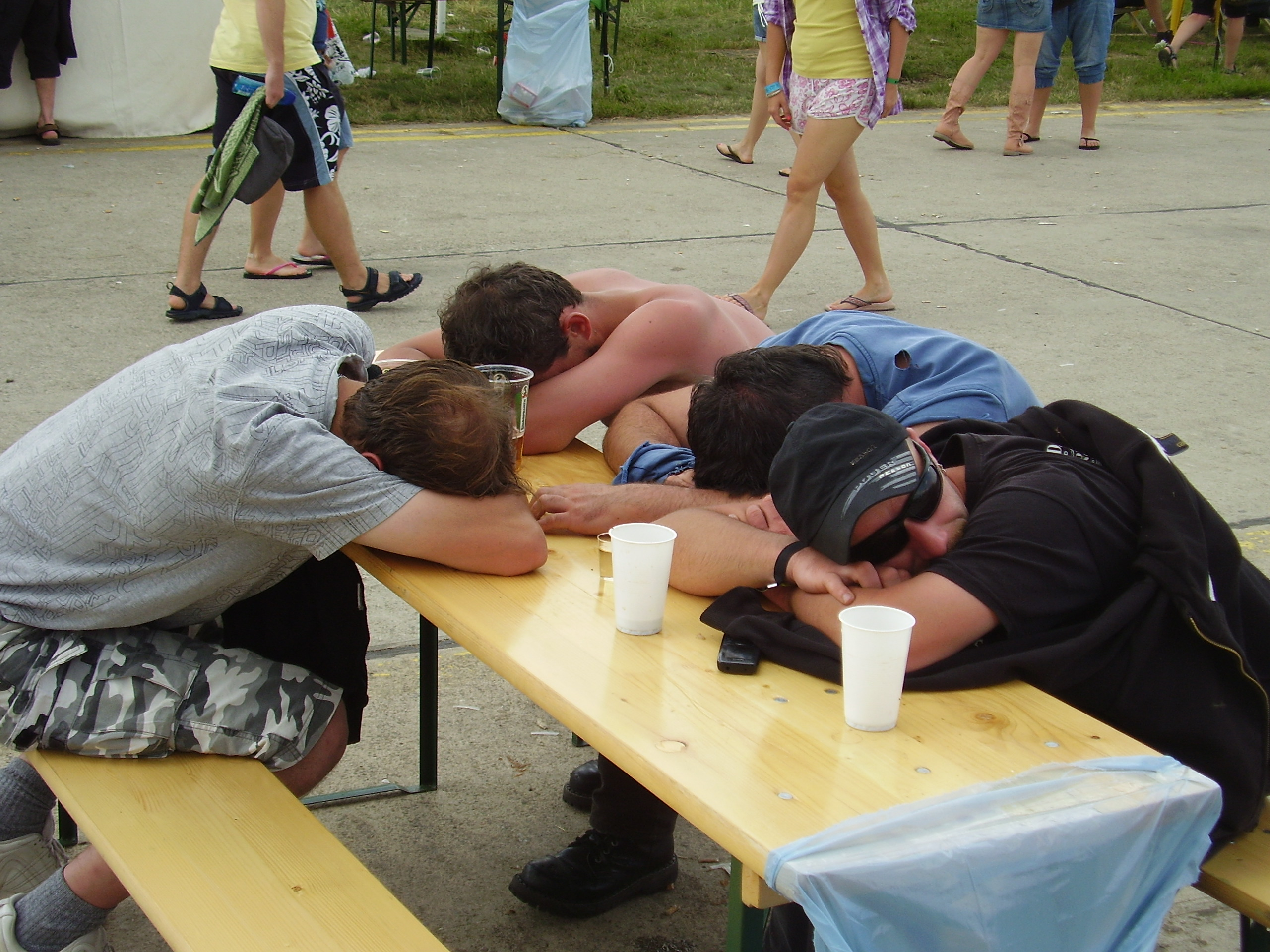 Drunken heavy metal fans at music festival in Slovakia